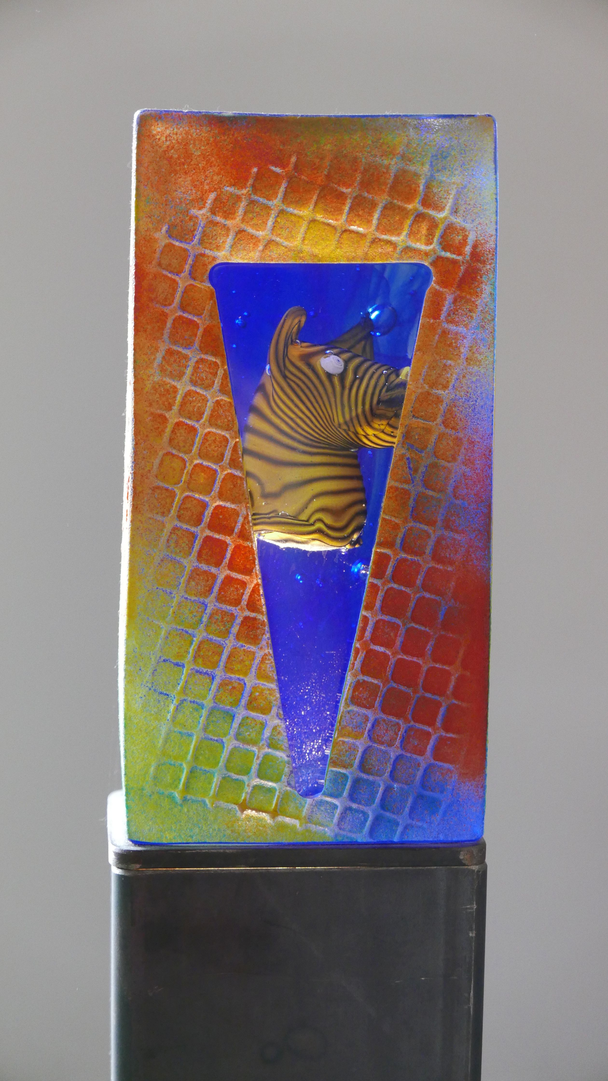 Lampenobjekt aus Glas K. Engman